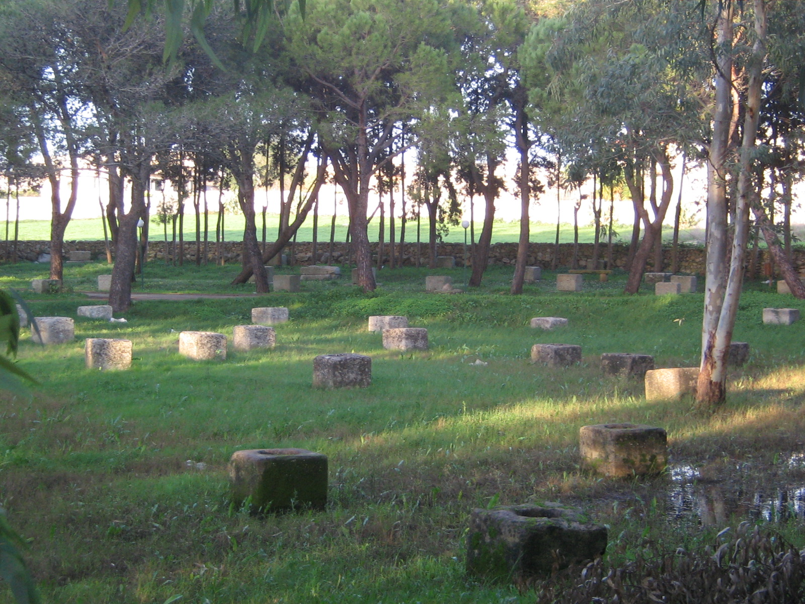 Pozzelle di Castrignano de' Greci